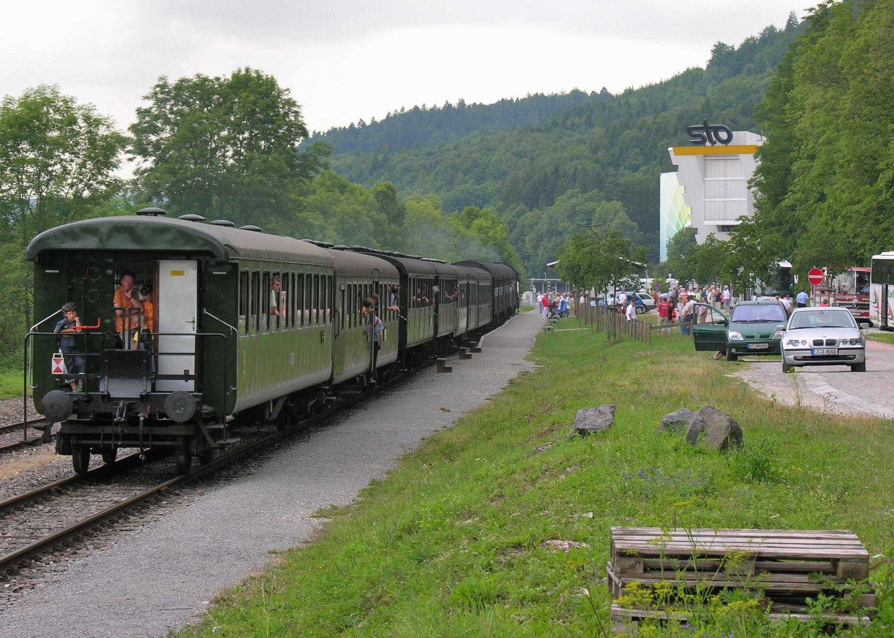 Dampflokomotive der Baureihe 86 im Bahnhof Weizen.